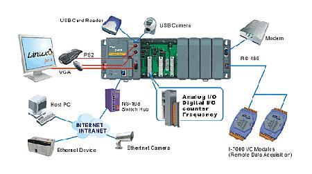 Red de Comunicación Industrial, fundamental al momento de controlar procesos de automatización industrial a gran escala.